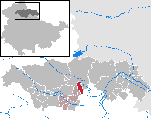 Oberbösa in Thuringia - Kyffhäuserkreis